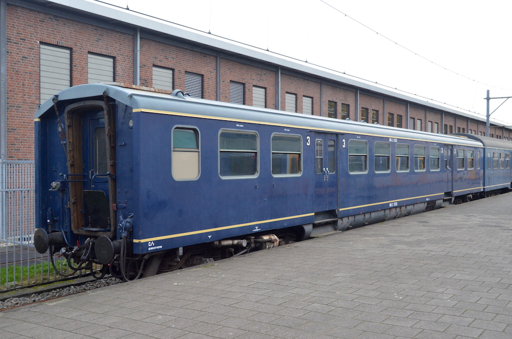 Nederlands Spoorwegmuseum rijtuig NS C 6703. Foto: Erik Swierstra.